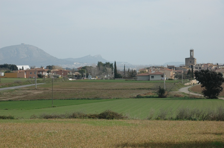 Parlavà amb el Montgrí al fons